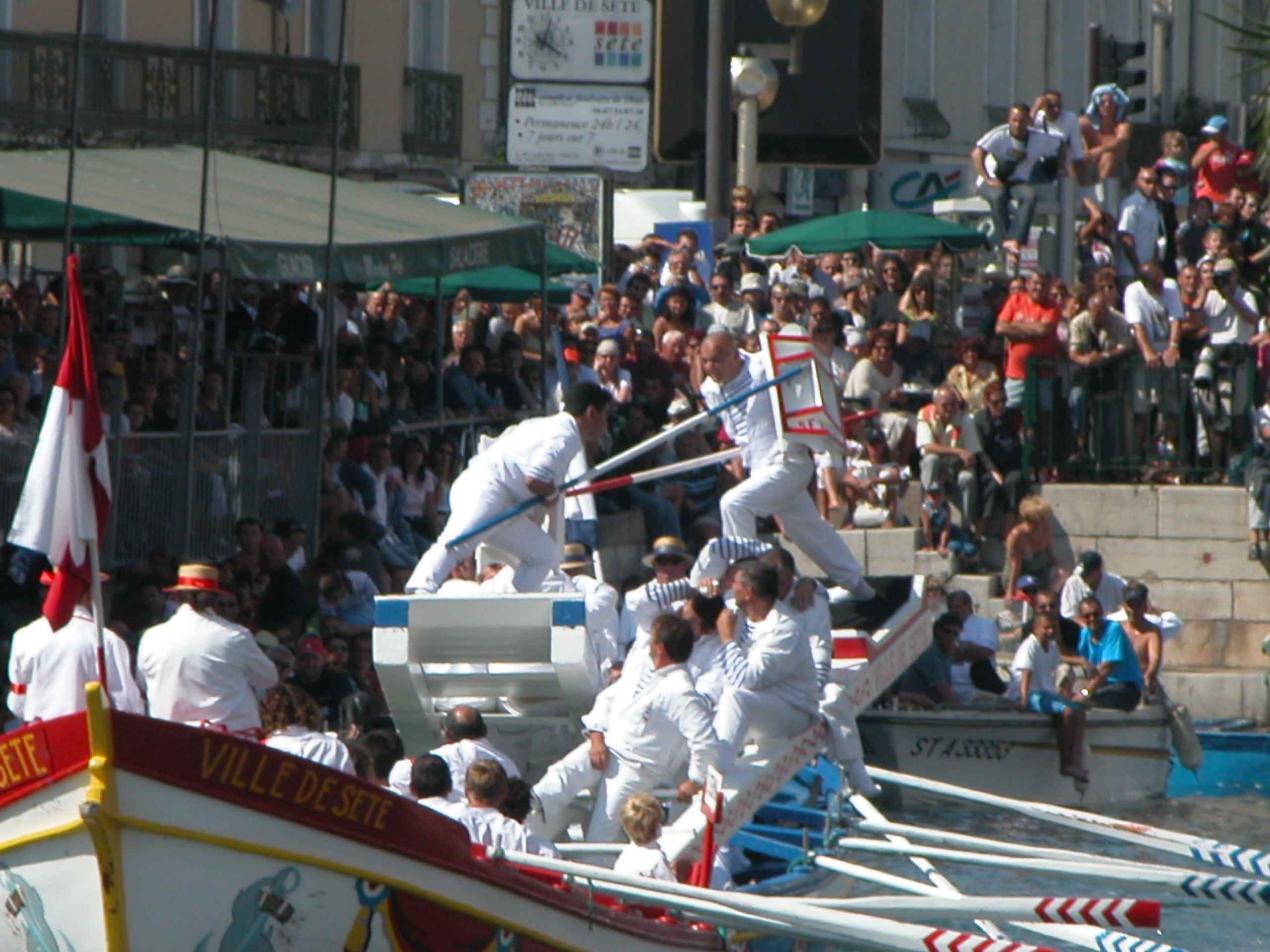 Joutes de la Saint Louis 2005 à Sète - Photo personnelle.